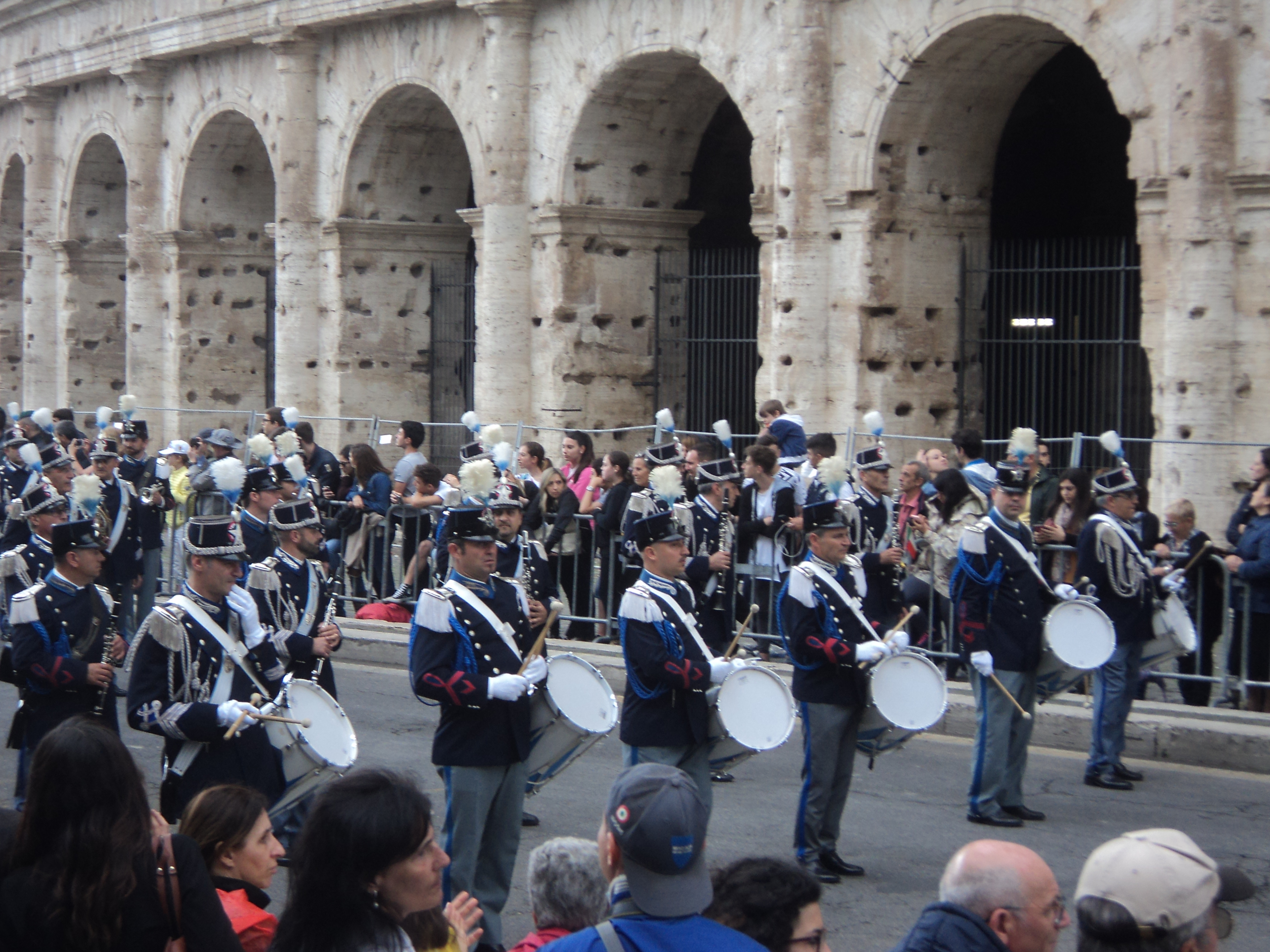 Festa della Repubblica 2016